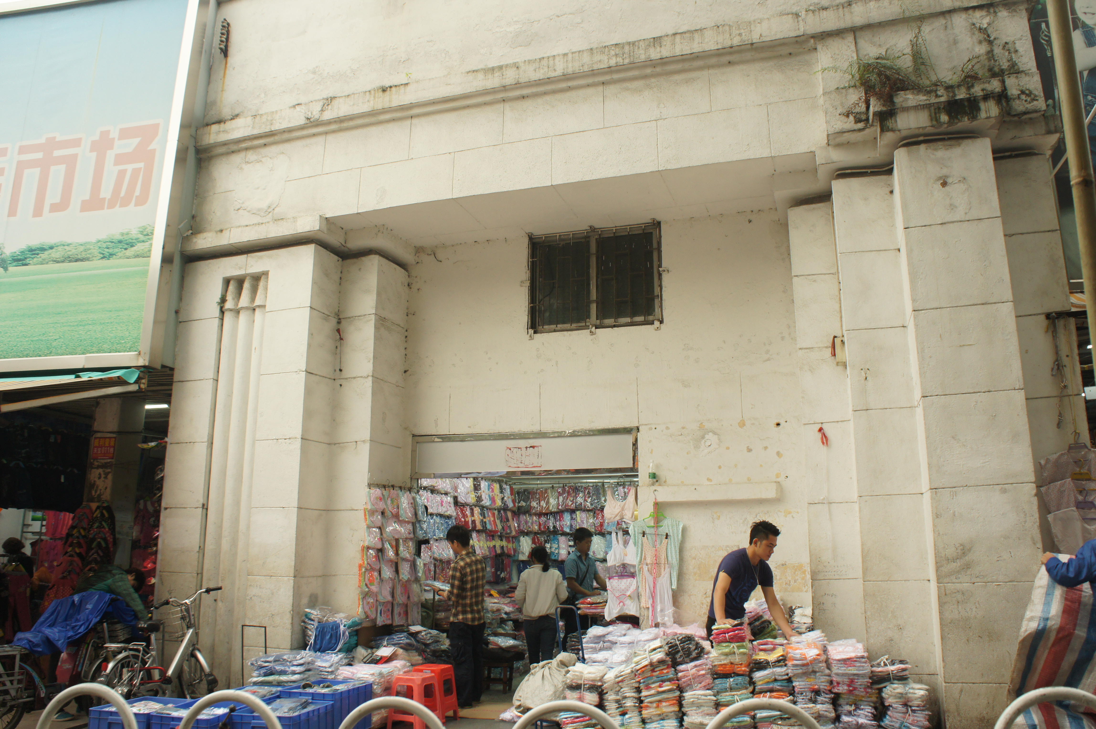 廣州市新一軍印緬陣亡將士公墓左門。